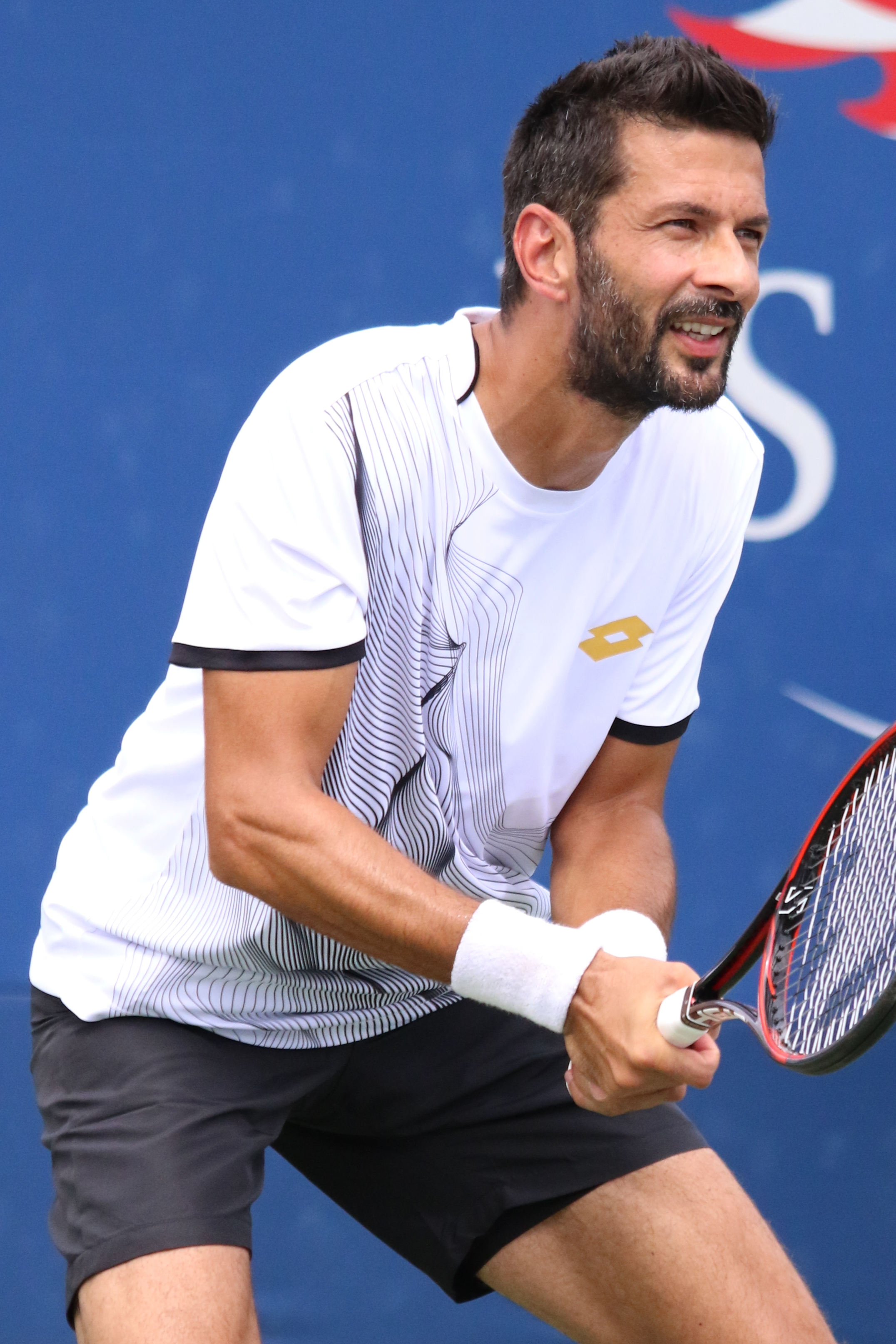 Knowle US16 (10)